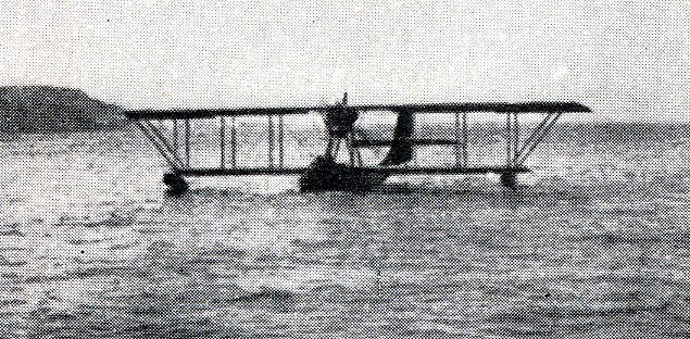 Hidroavião D. D. 3, no rio Tejo, junto a Lisboa.